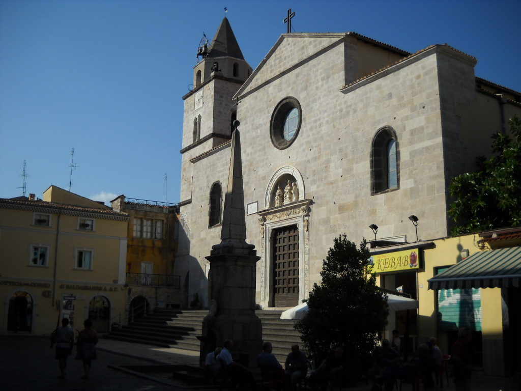 Fondi Chiesa di Santa Maria in Piazza